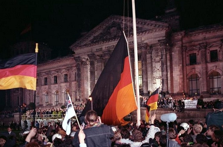 ADN-ZB-Grimm-3.10.90-Berlin: Vereinigung/Hunderttausende waren dabei, als vor dem Reichstag die schwarz-rot-goldene Bundesfahne gehißt wurde. (Translated: Hundreds of thousands were there when the black, red and gold federal flag was hoisted in front of the Reichstag.)